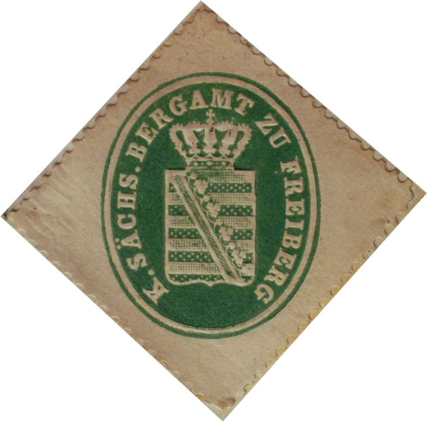 Siegelmarke